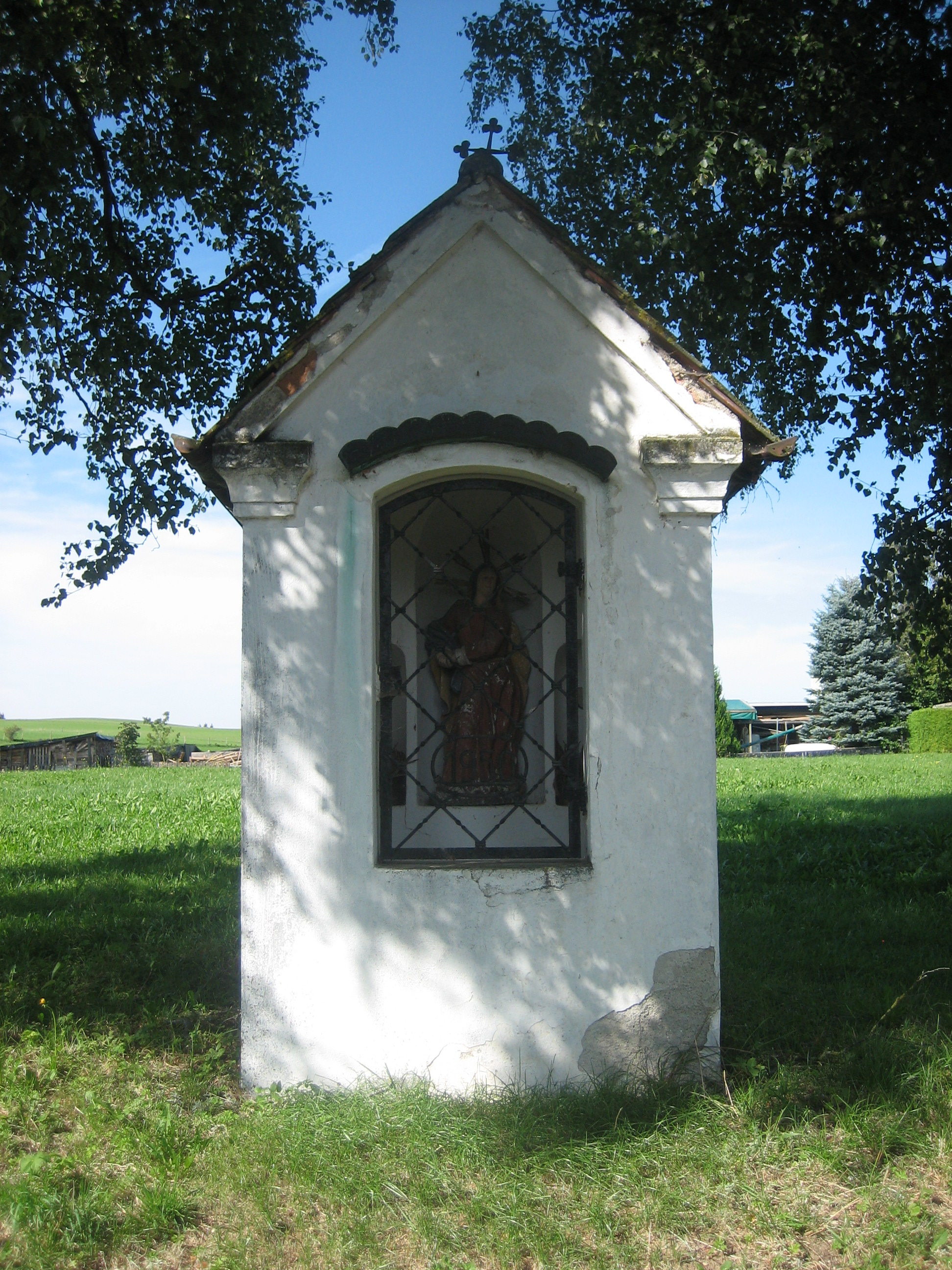 Wegkapelle in Herbisried (1950), Bad Grönenbach, Bayern